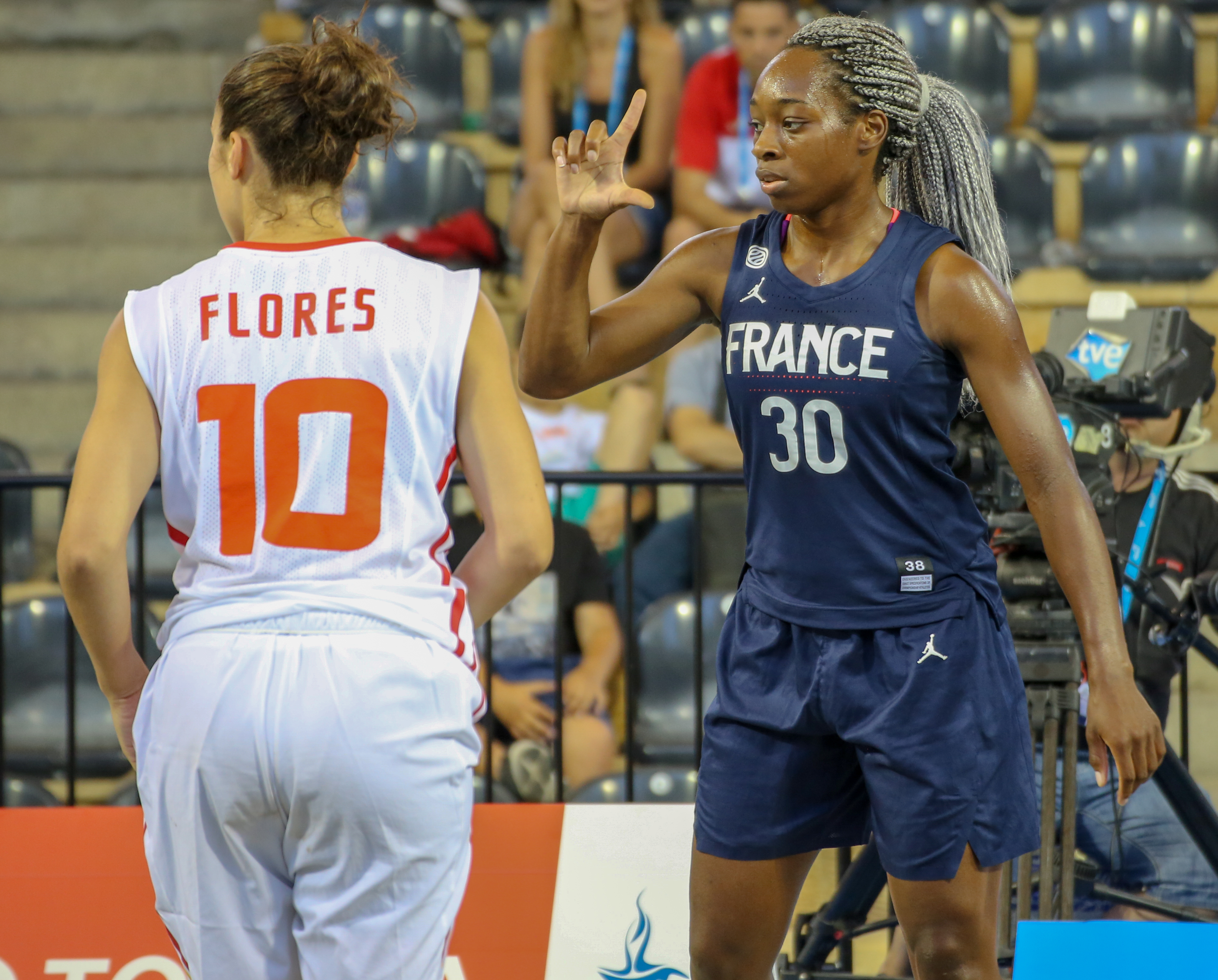 Victoria Majekodunmi en los Juegos del Mediterráneo 2018